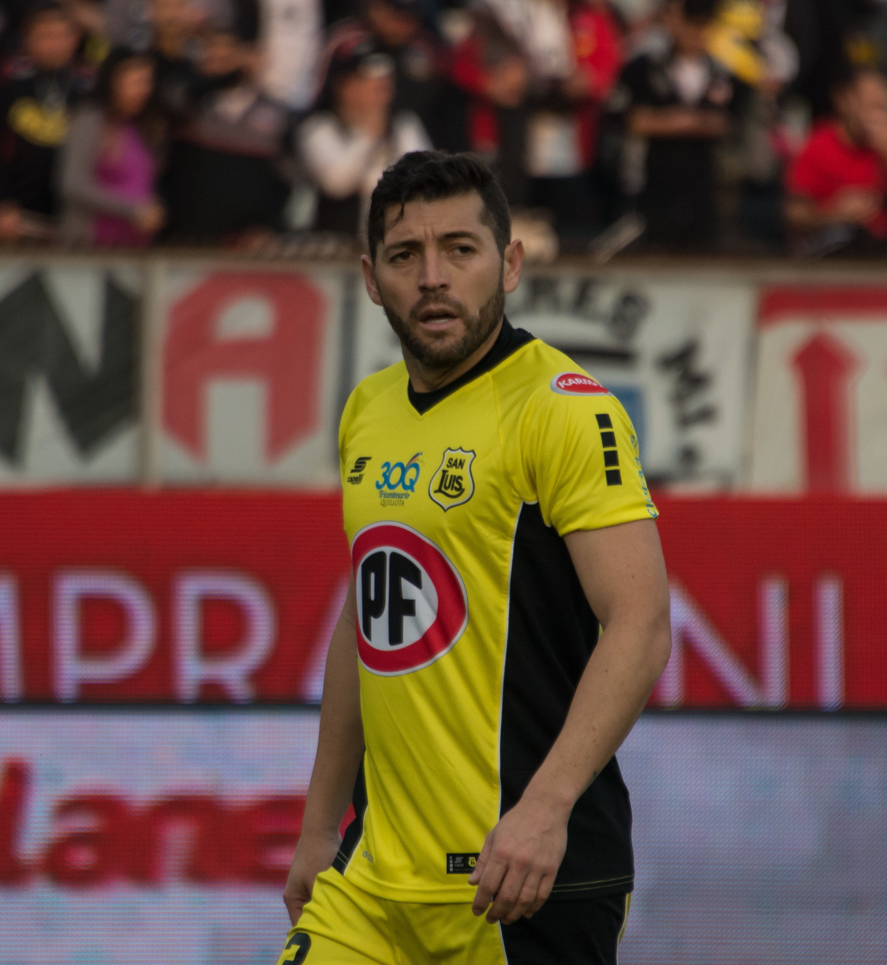 José Rojas, Colo-Colo v San Luis, Estadio Monumental, Macul, Santiago, Chile.